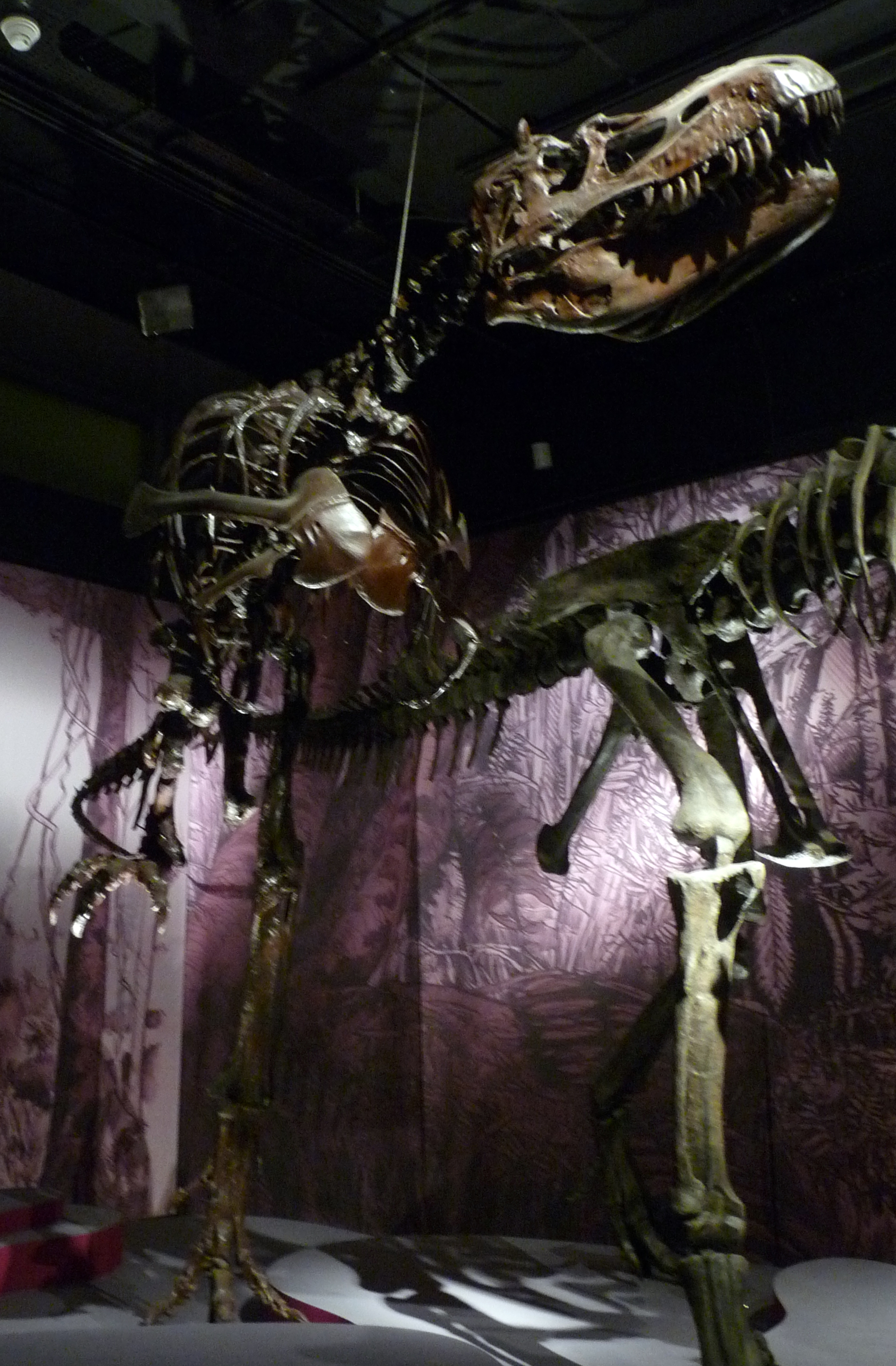 @ musée national d'histoire naturelle